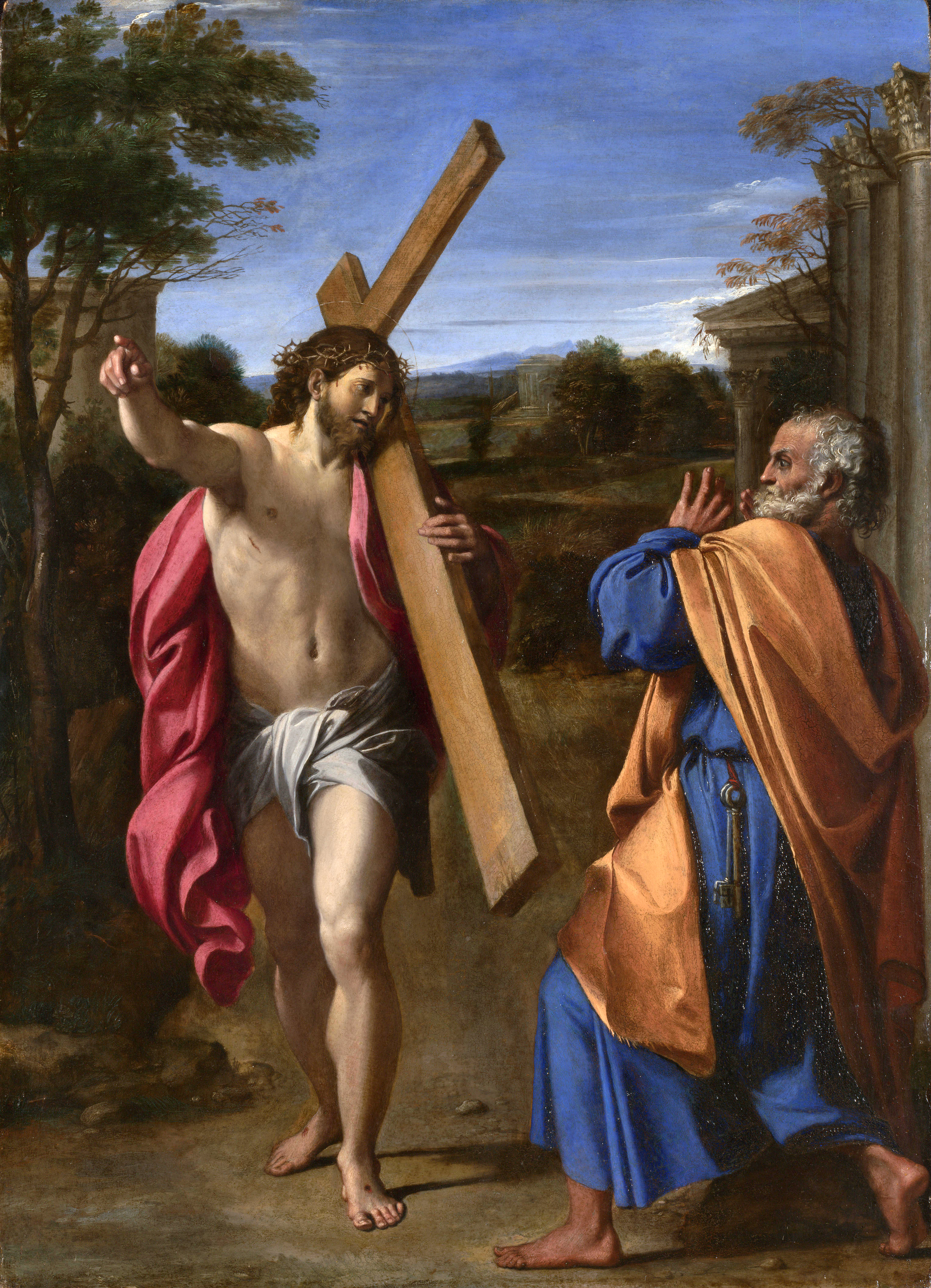 Domine quo vadis? (Oil on canvas, 77 x 56 cm)